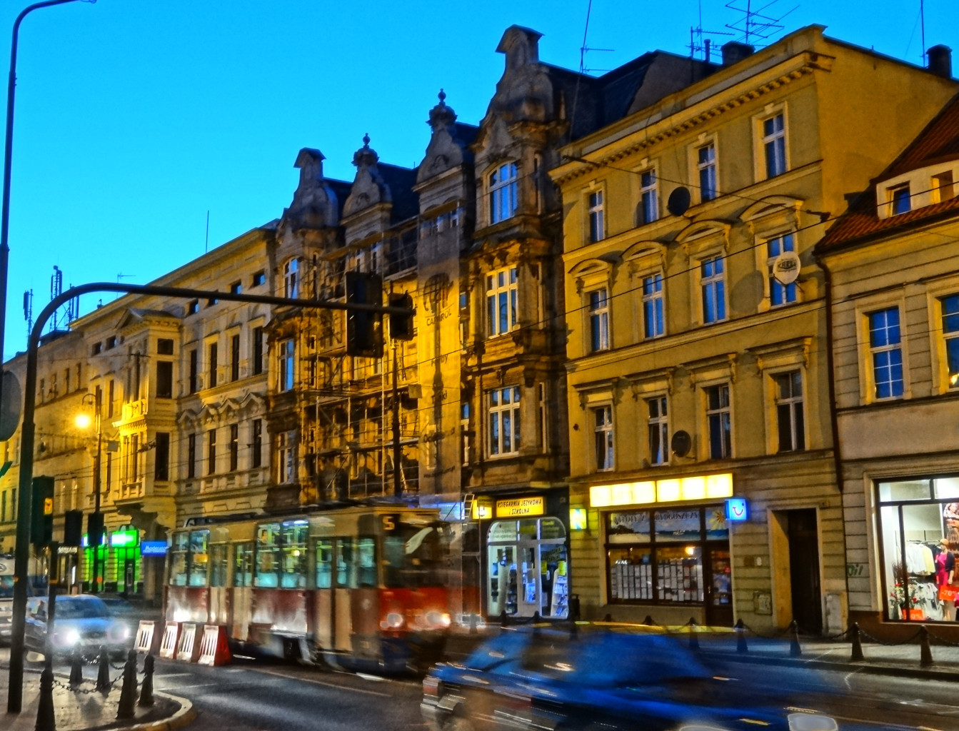 Ulica Ferdynanda Focha w Bydgoszczy